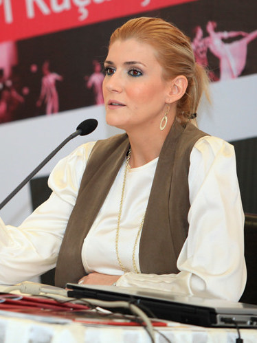 Özge Uzun